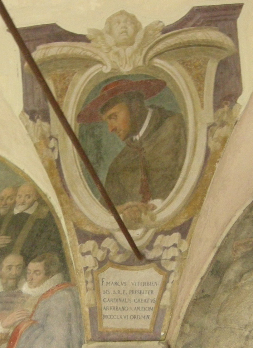 Chiostro di ognissanti, personalità francescane 24 marco da viterbo